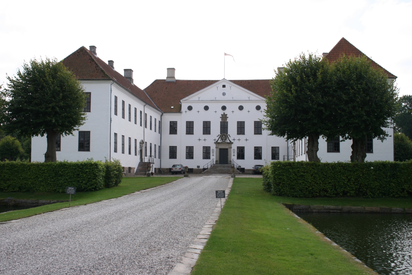 Clausholm slot, set fra indgangsssiden.